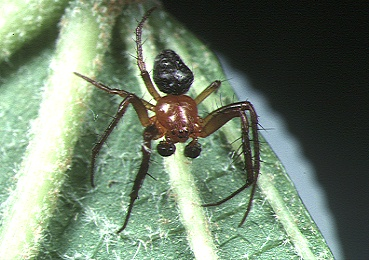 male Araneus ryukyuanus from Okinawa.